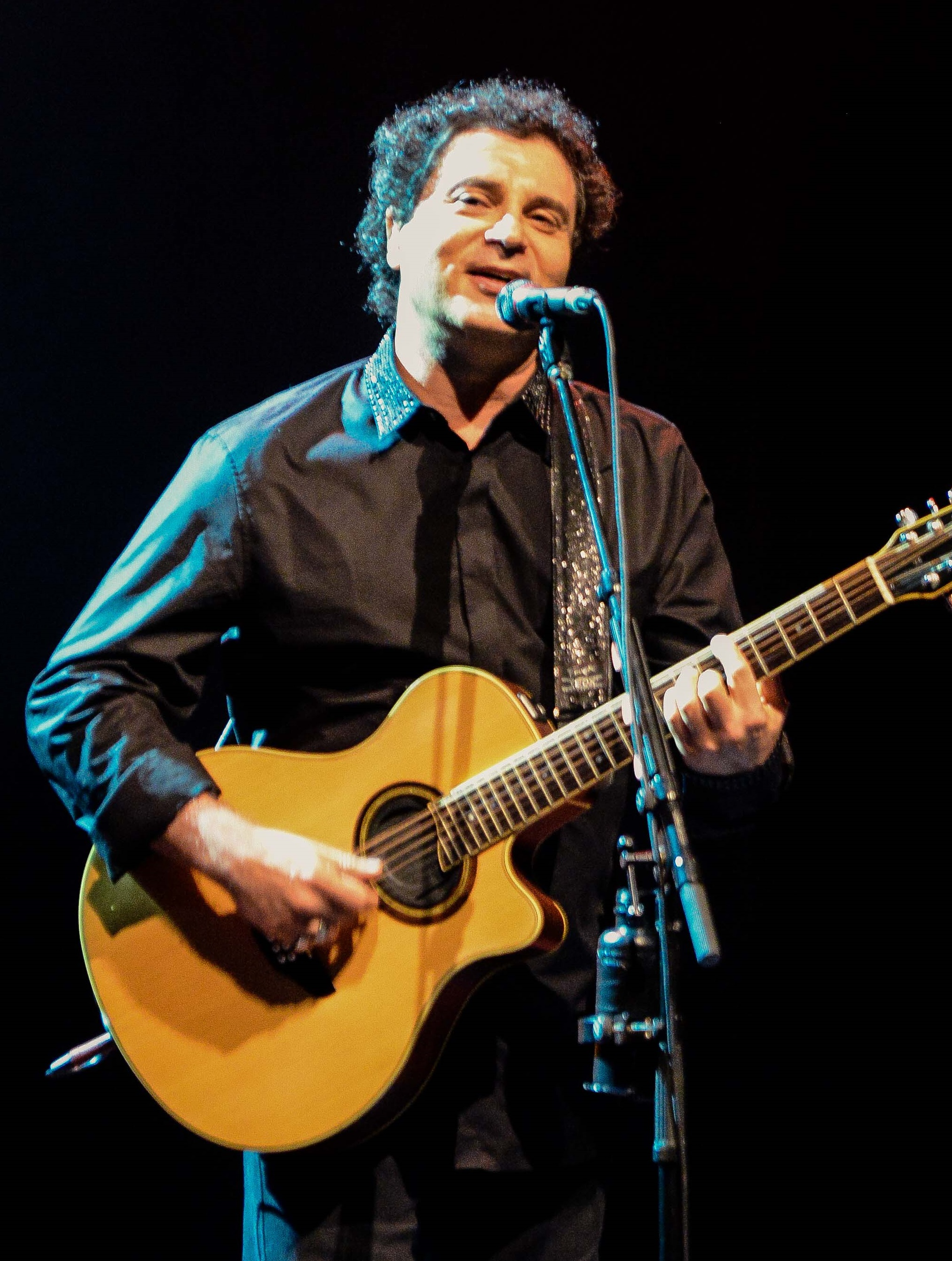 Frejat em março de 2018